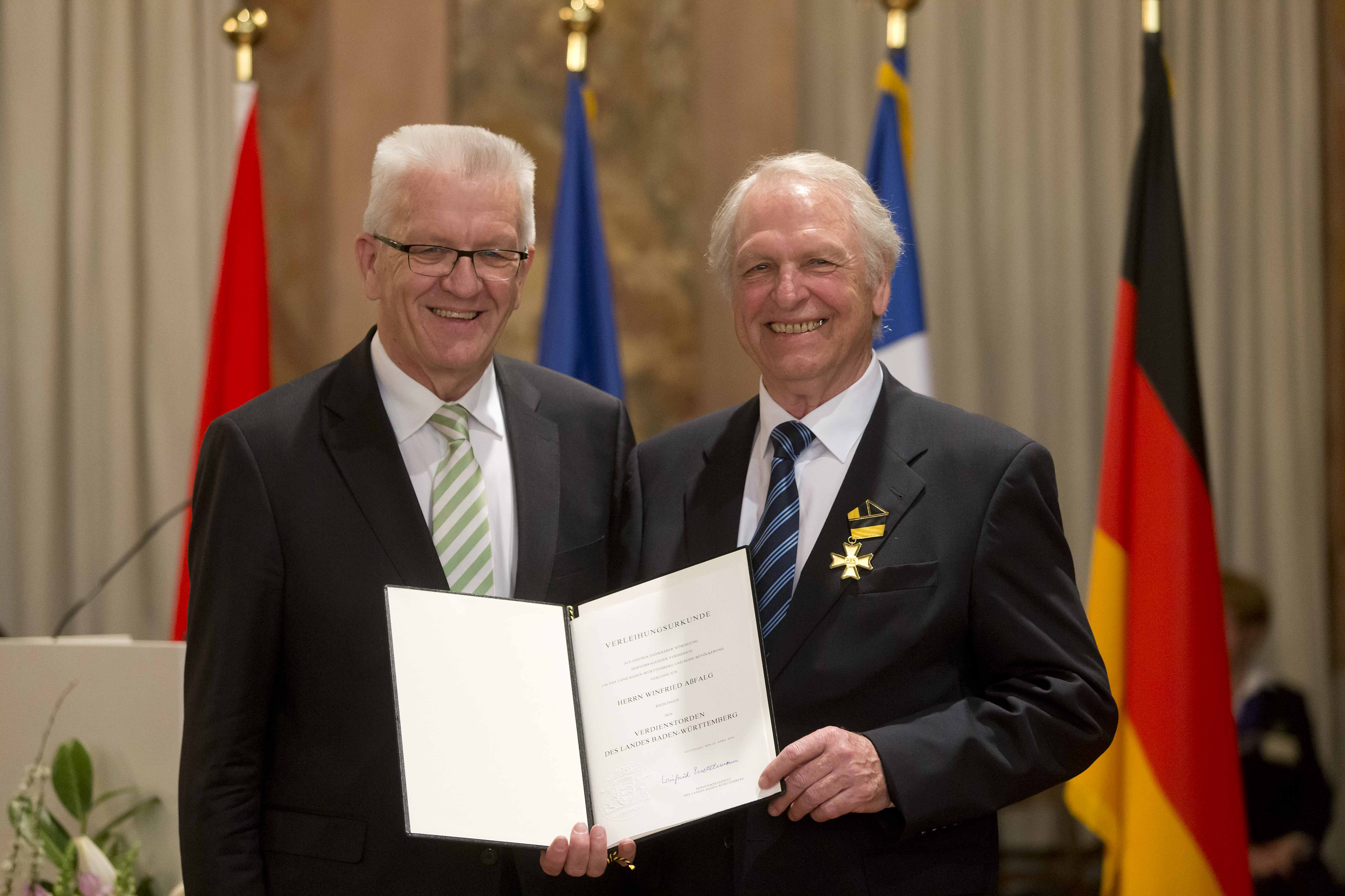 Winfried Kretschmann u. Winfried Aßfalg bei der Verleihung des Verdienstordens des Landes Baden-Württemberg am 23. April 2016 (seit 2016 in Form eines stilisierten Kreuzes)